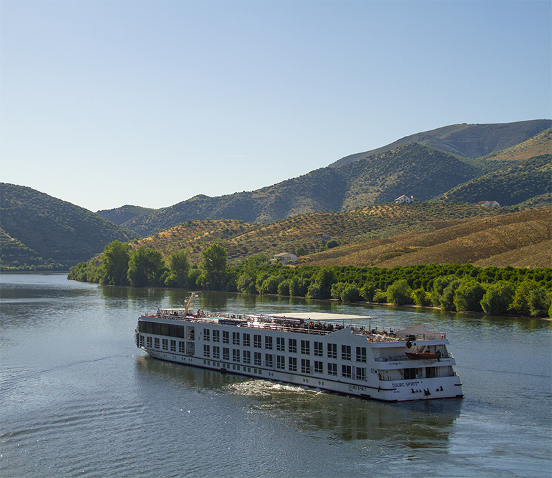 Crucero portugués en Barca d'Alva - La Fregeneda. Parque Natural del Duero Internacional (Portugal). Parque Natural de Arribes del Duero (España)